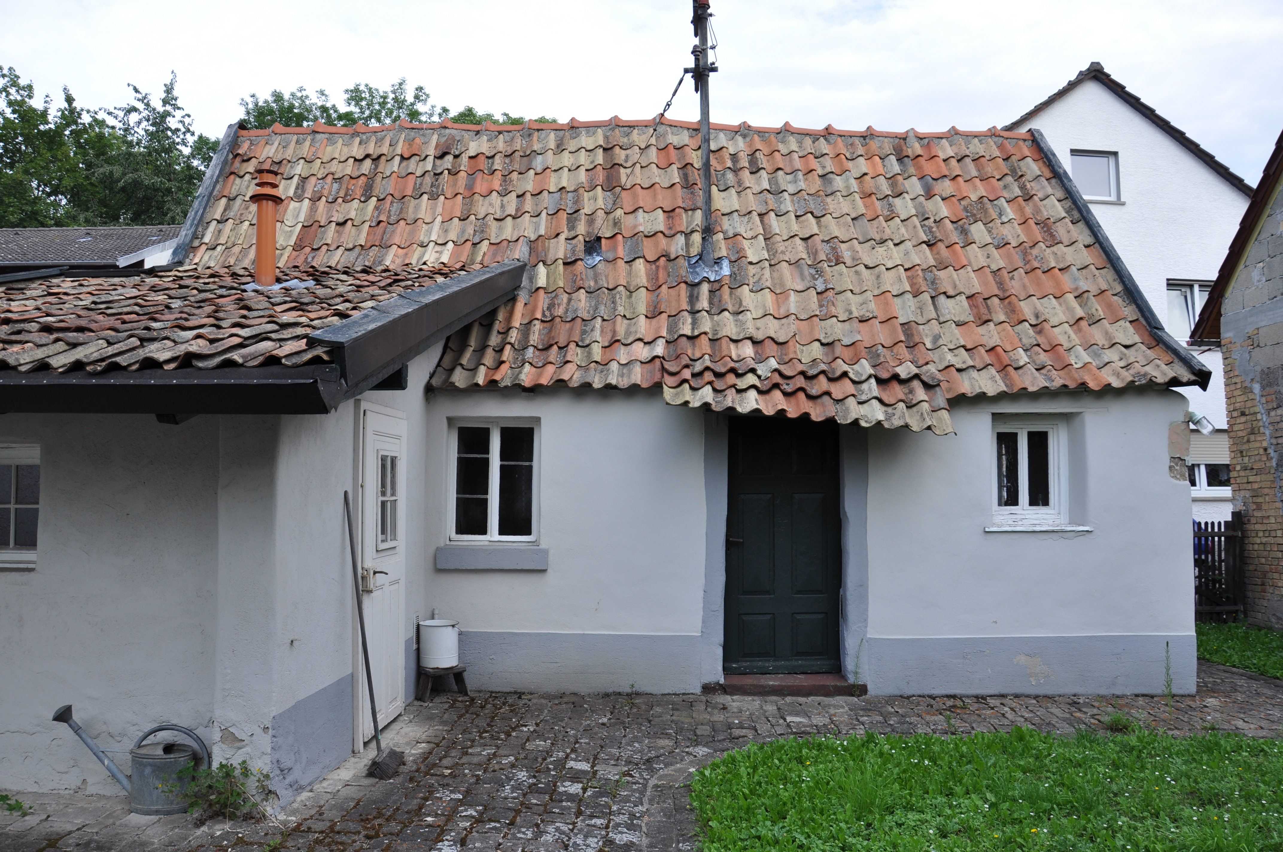 Hofseite des Wörrstädter Tagelöhnerhauses